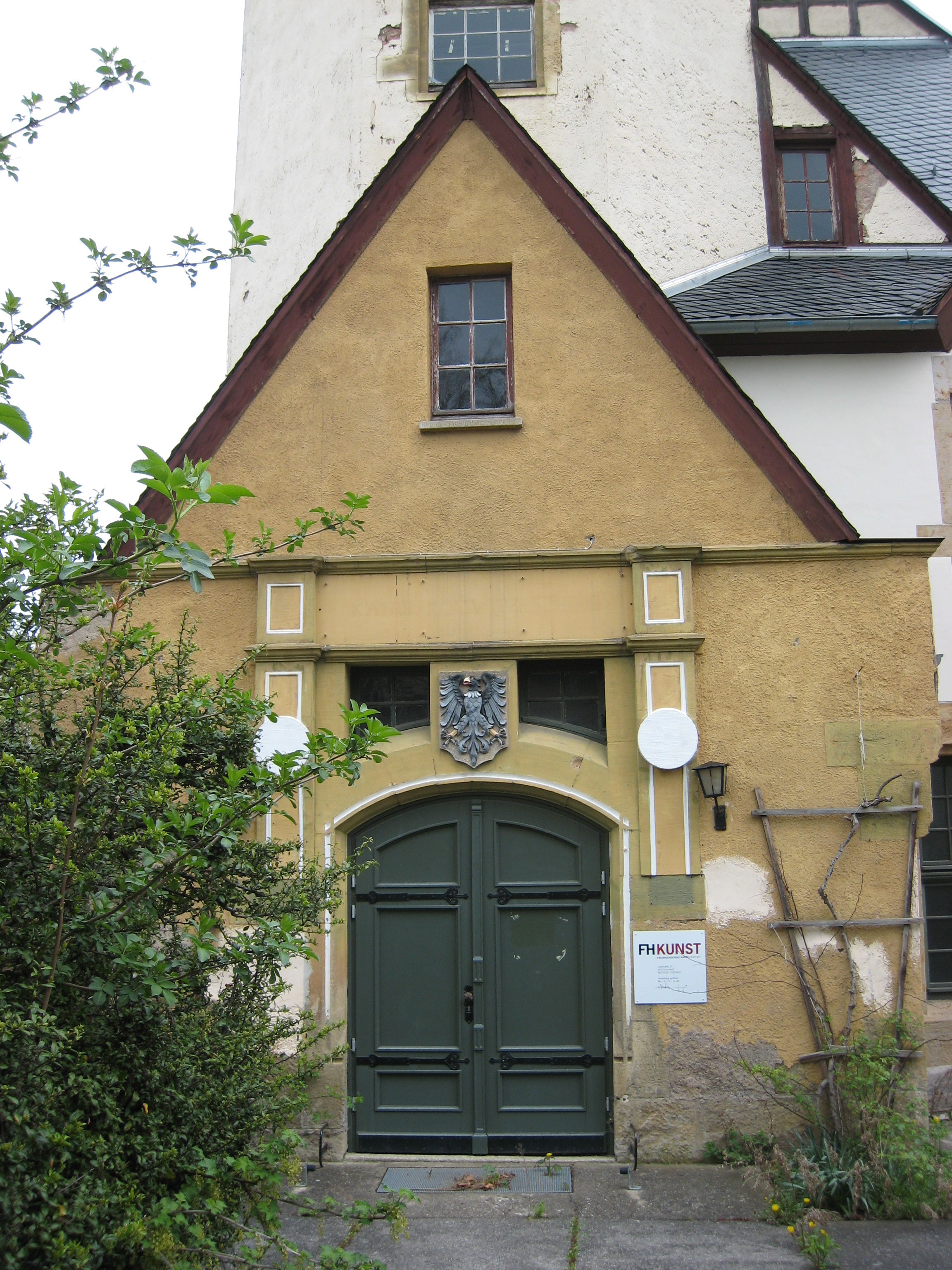 La iama fakaltlernejo de artoj en Arnstadt, enirejo disde LInden-aleo, stato de 2014.